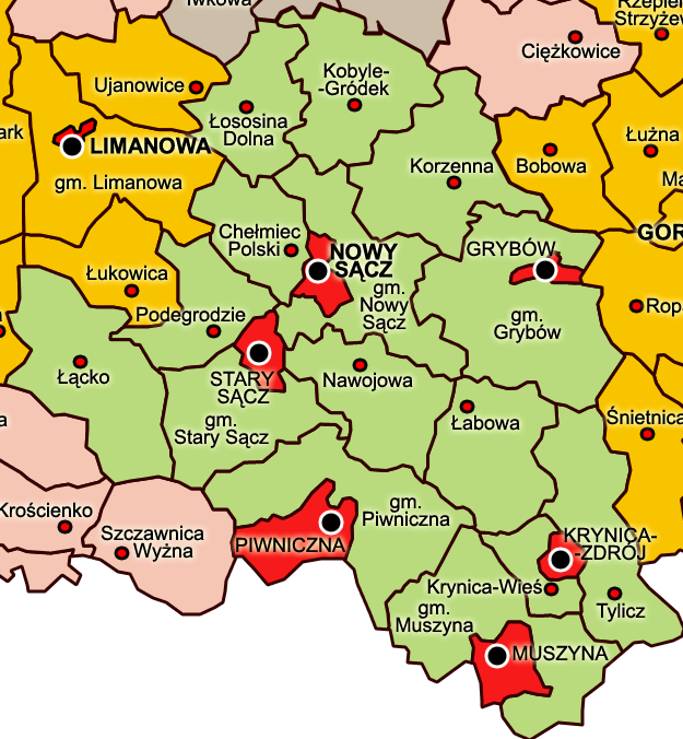 Повіт Новий Санч 1938